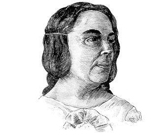 María de Zayas y Sotomayor (12 de noviembre de 1590 - ¿1661?), novelista española del Siglo de Oro.